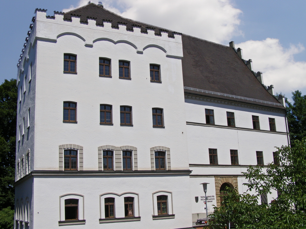 Krumbach (Schwaben) - Lichtenstein-Schloss